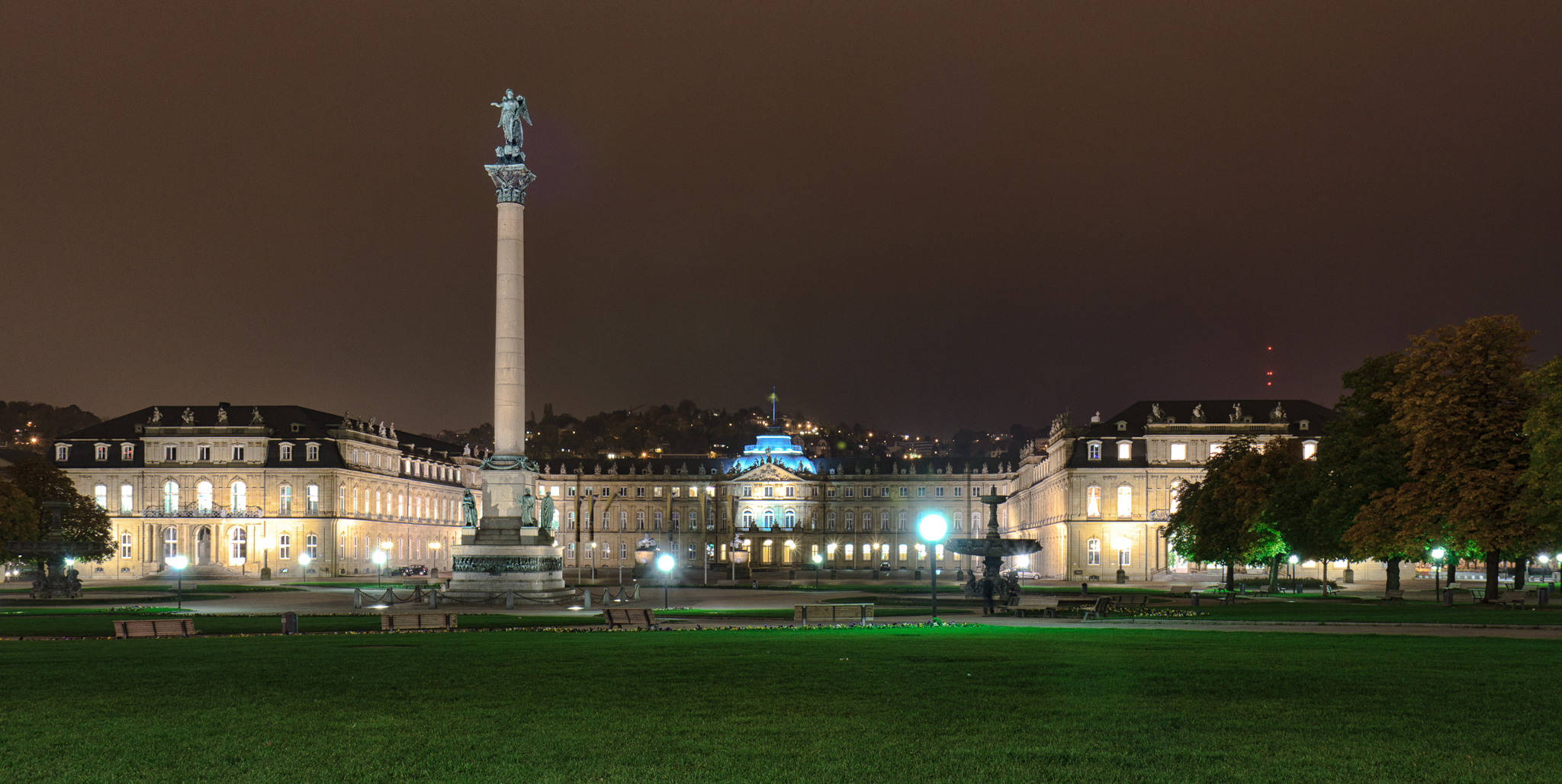 Neues Schloss Stuttgart 2012